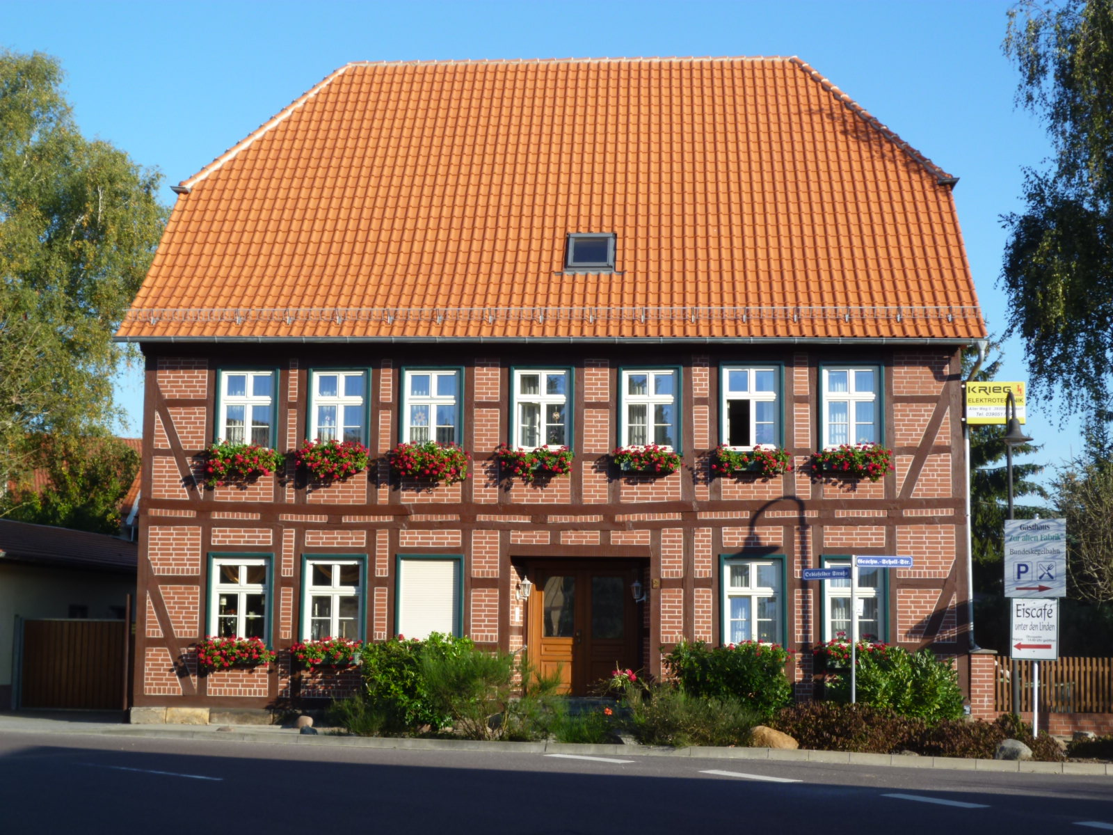 Das Calvörder Schwesternhaus - Sozialstation - 2011